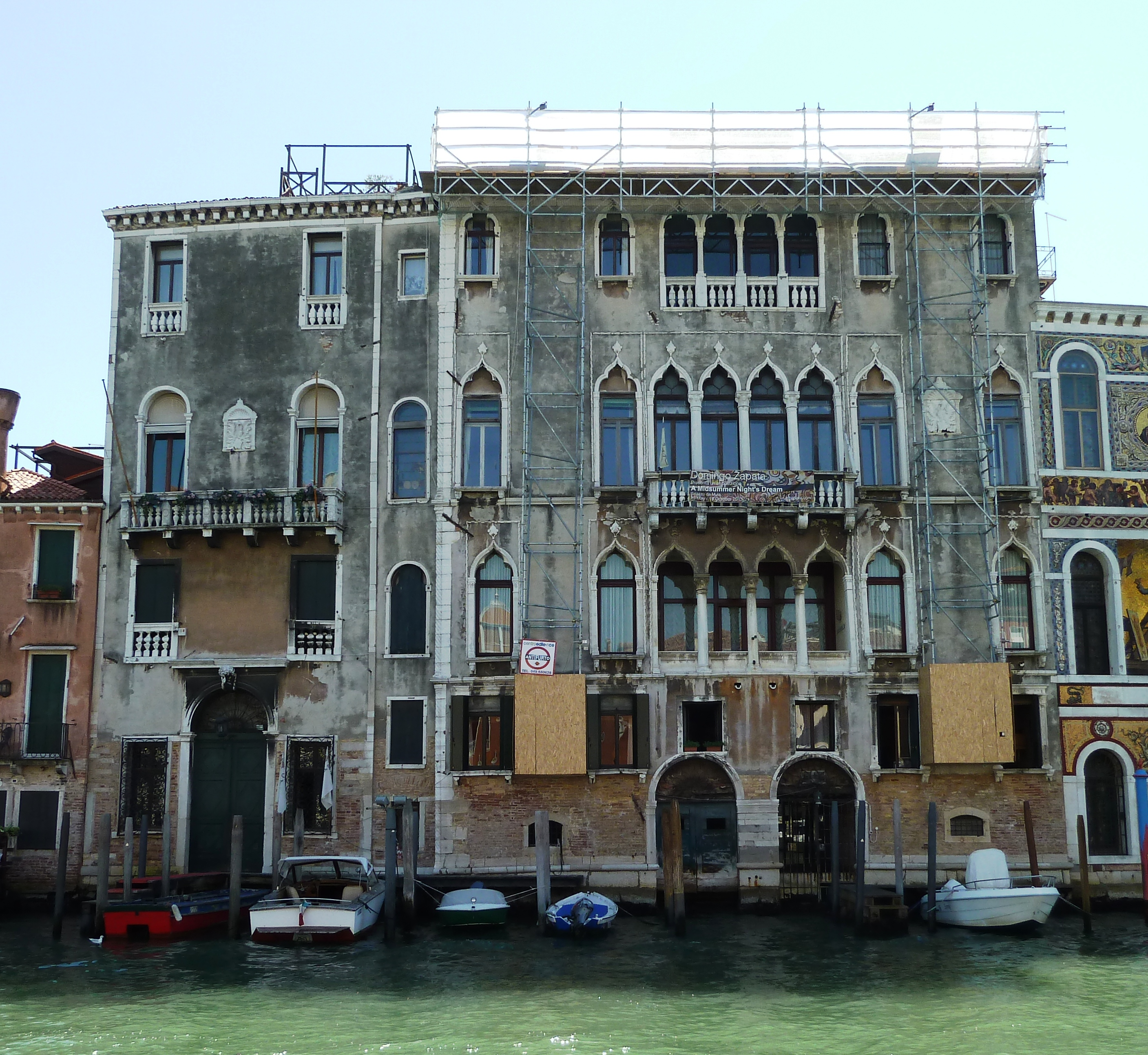 pal du mula